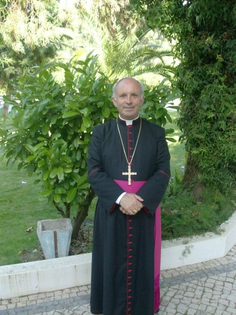 Antonio Francisco dos Santos Bispo de aveiro